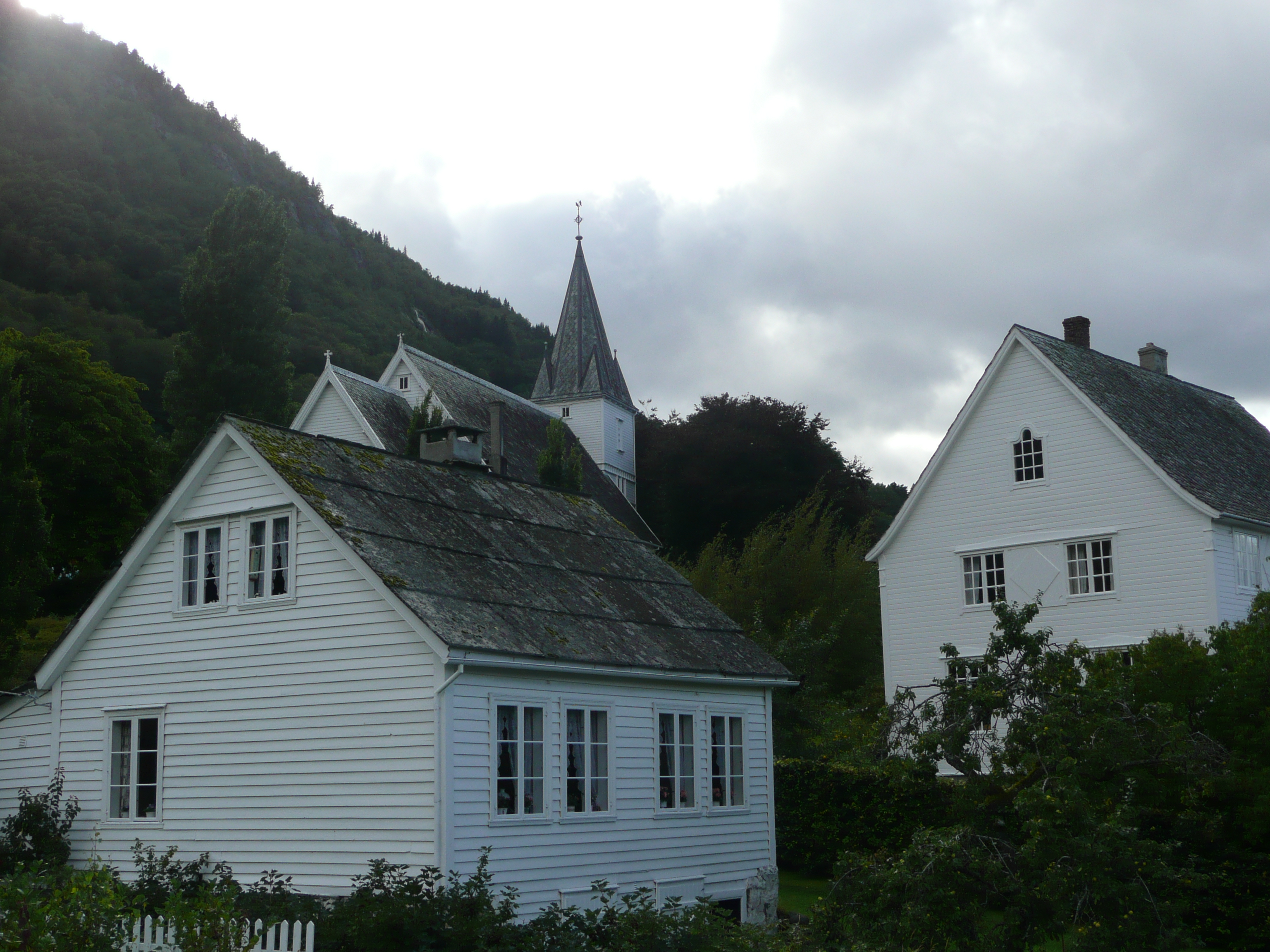 Utne